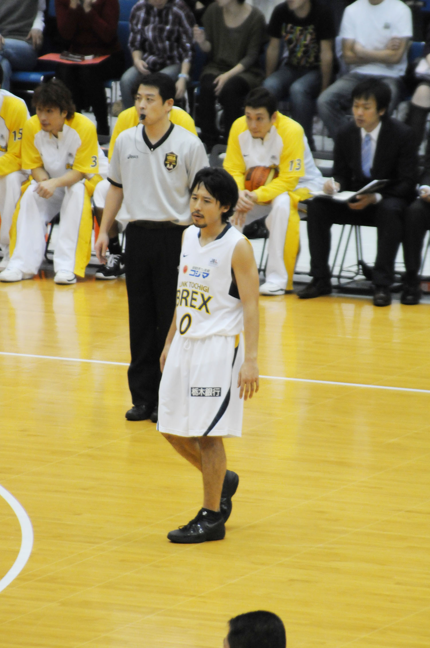 リンク栃木ブレックスの田臥勇太選手。とどろきアリーナで。